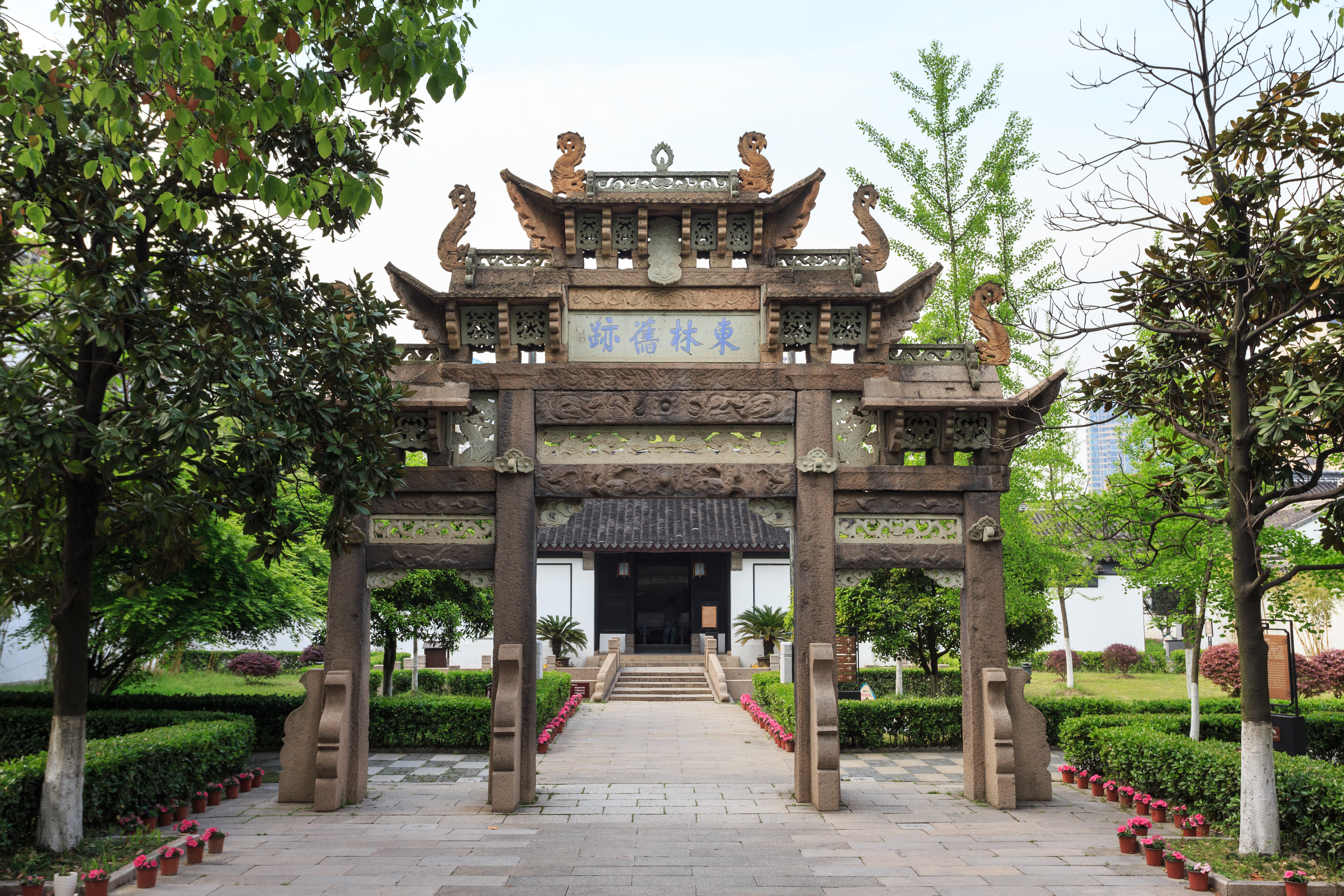 无锡东林书院 石牌坊